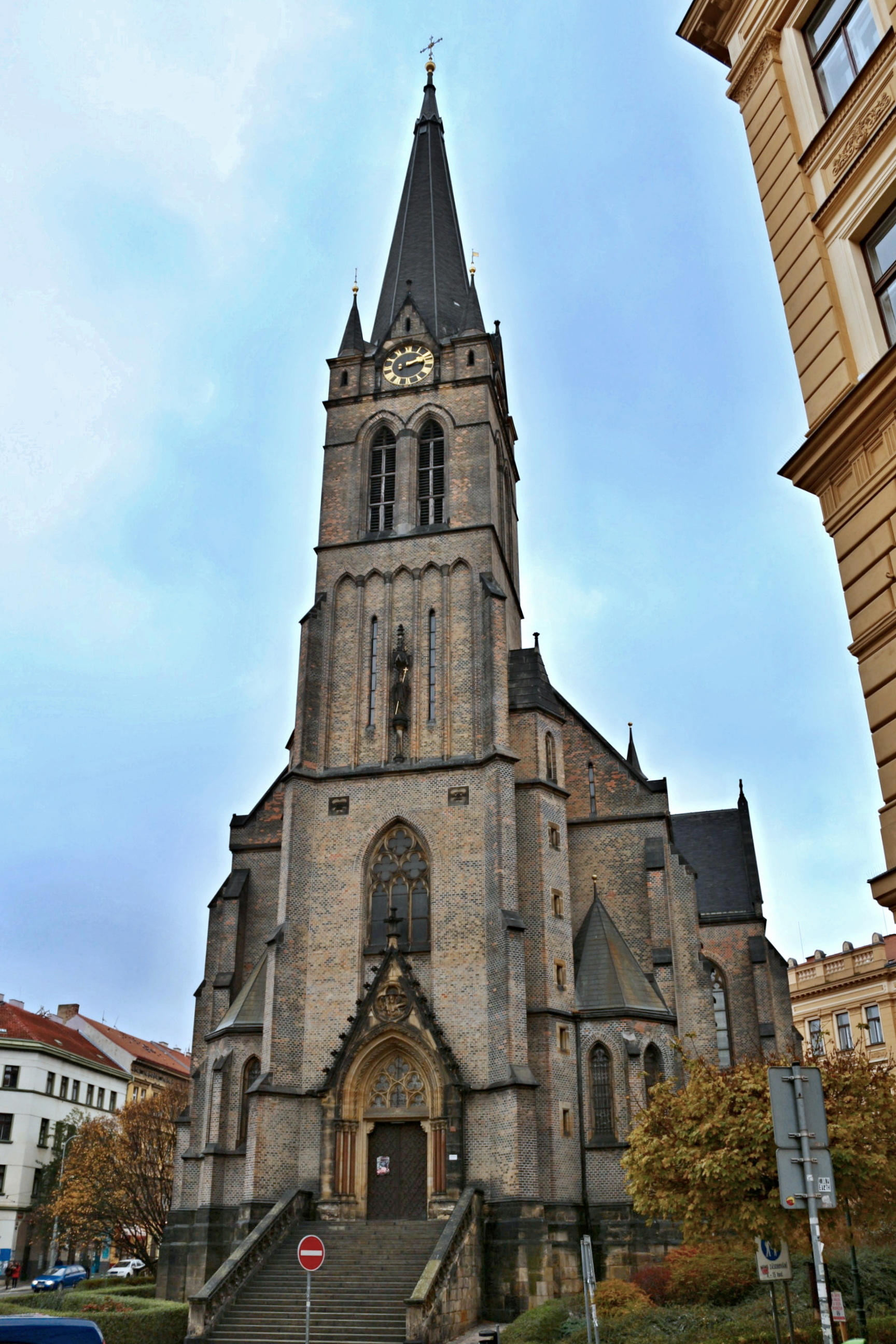 Žižkov nám. Sladkovského